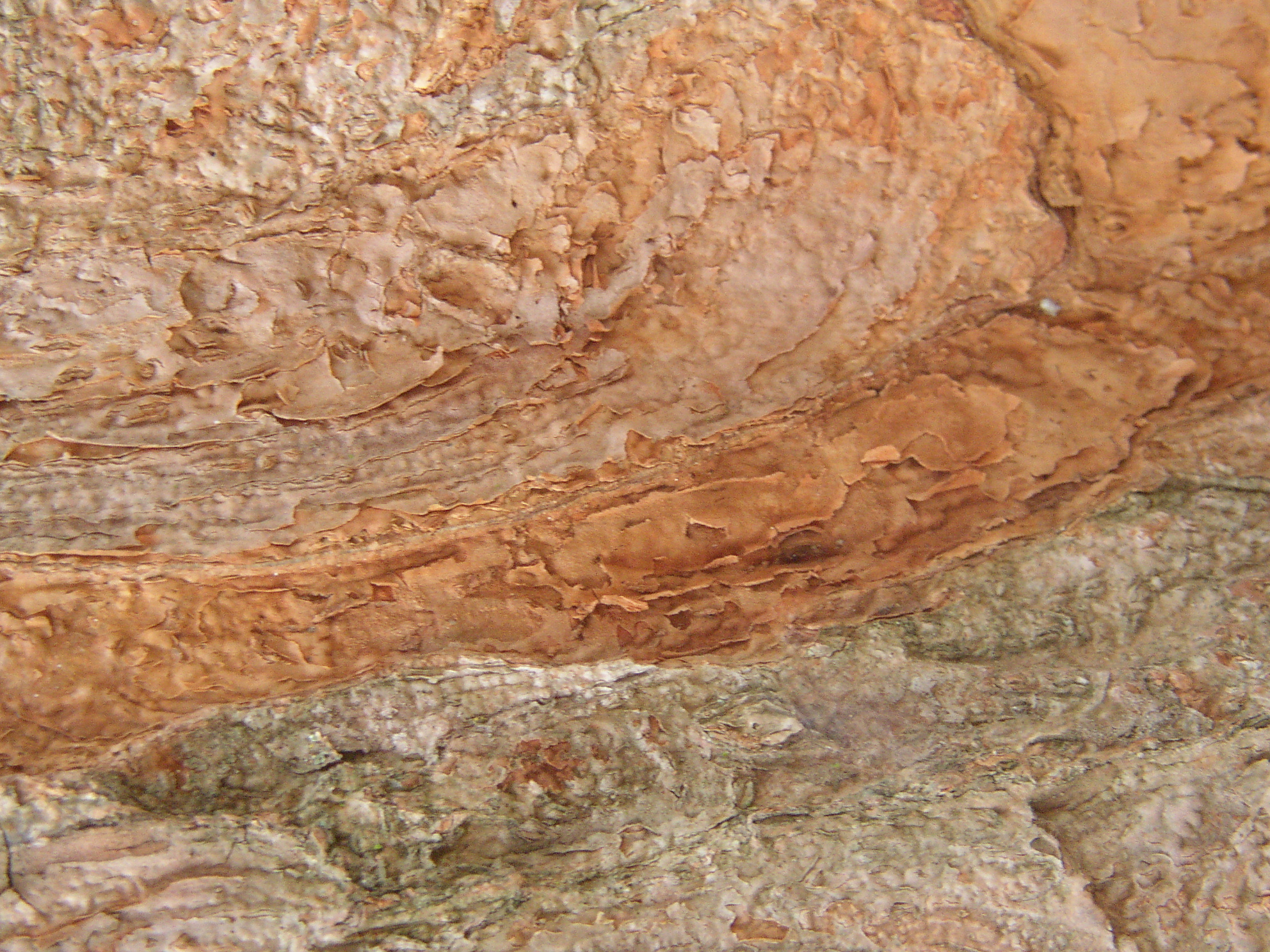 Rinde des Brasilholz, Aufnahme im Park Córrego Grande in Florianópolis, SC, Brasilien